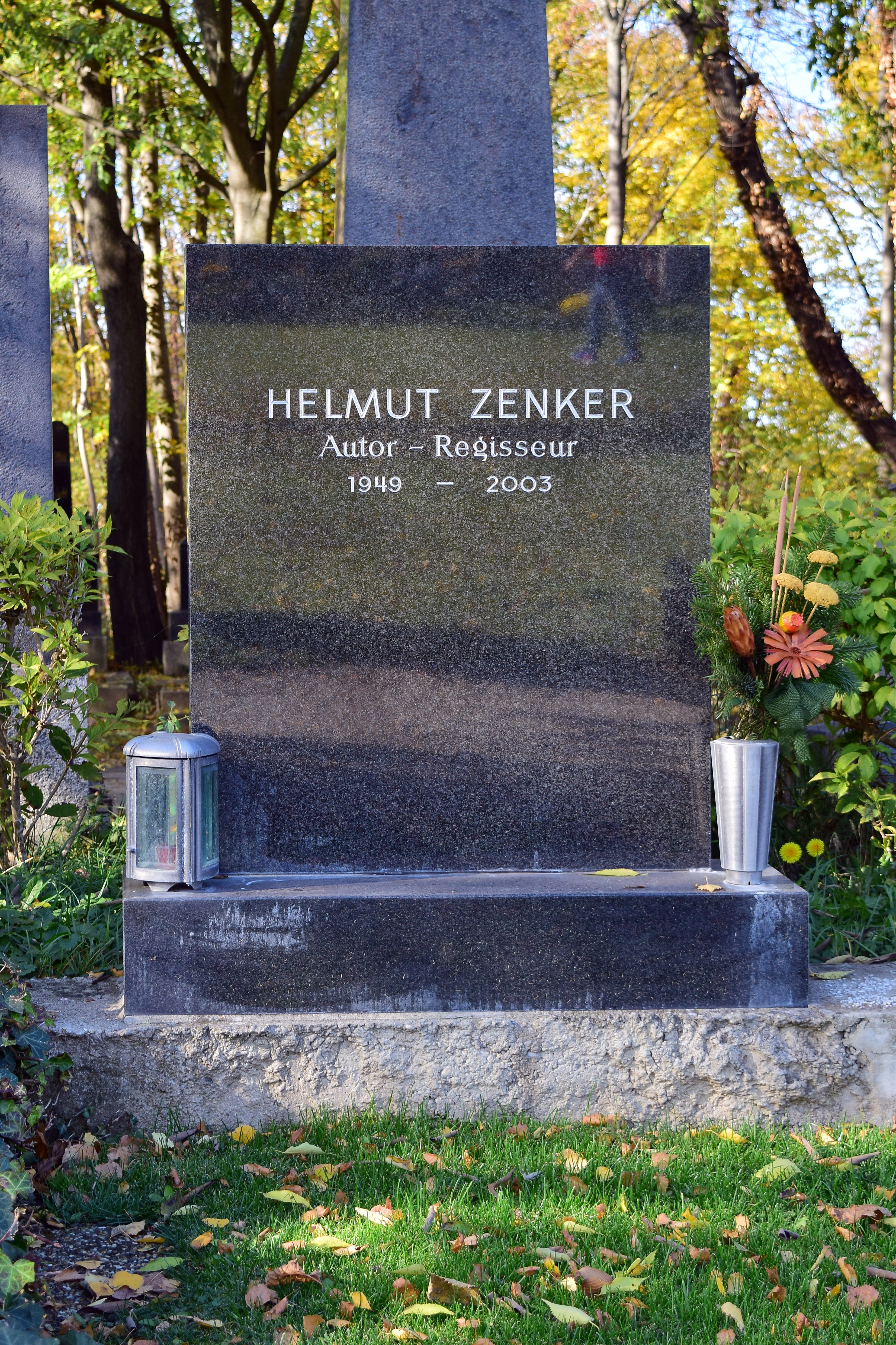 Ehrengrab von Helmut Zenker auf dem Wiener Zentralfriedhof, Gruppe 40